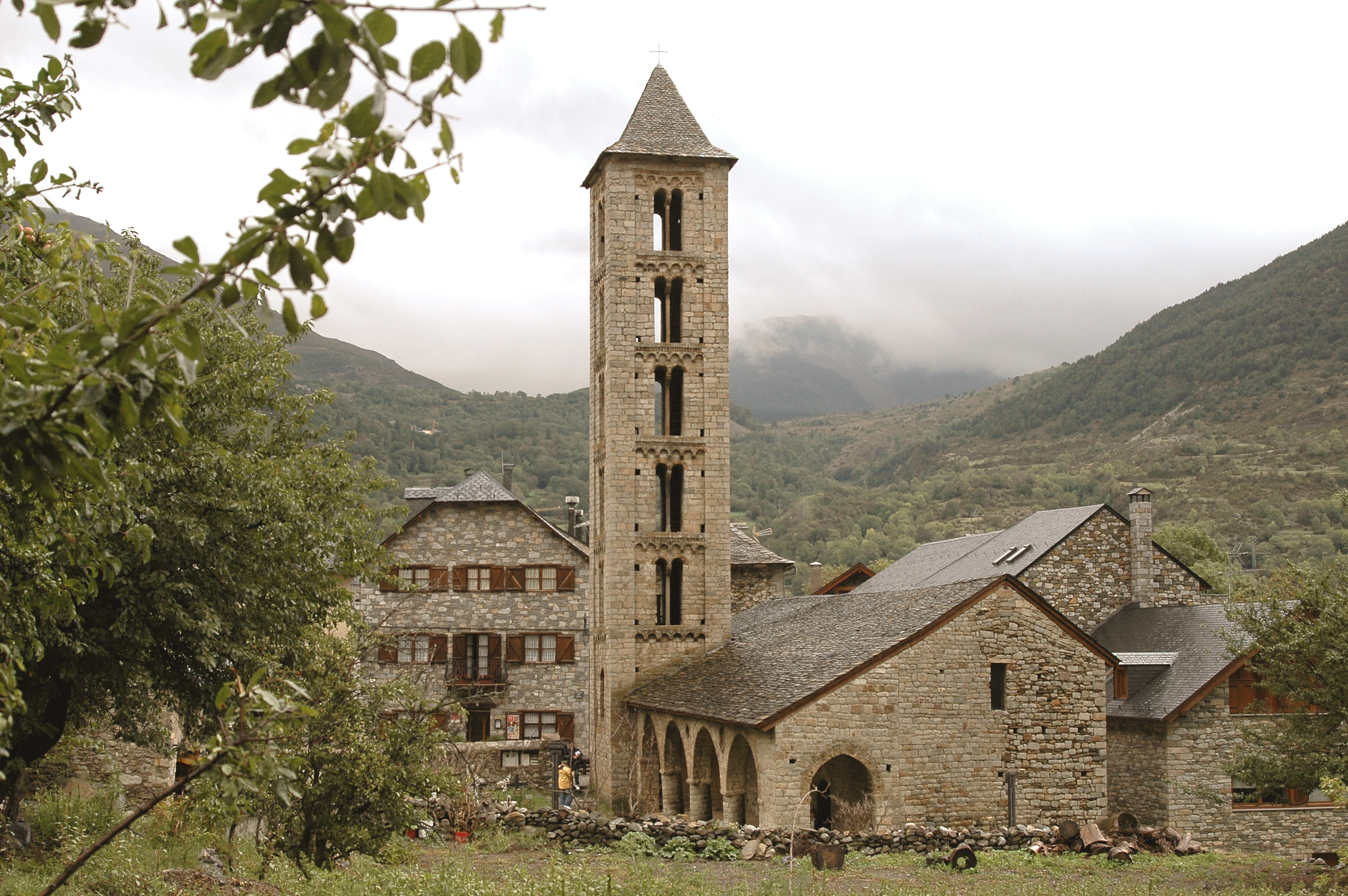 Església de Santa Eulàlia d'Erill-la-Vall (la Vall de Boí)